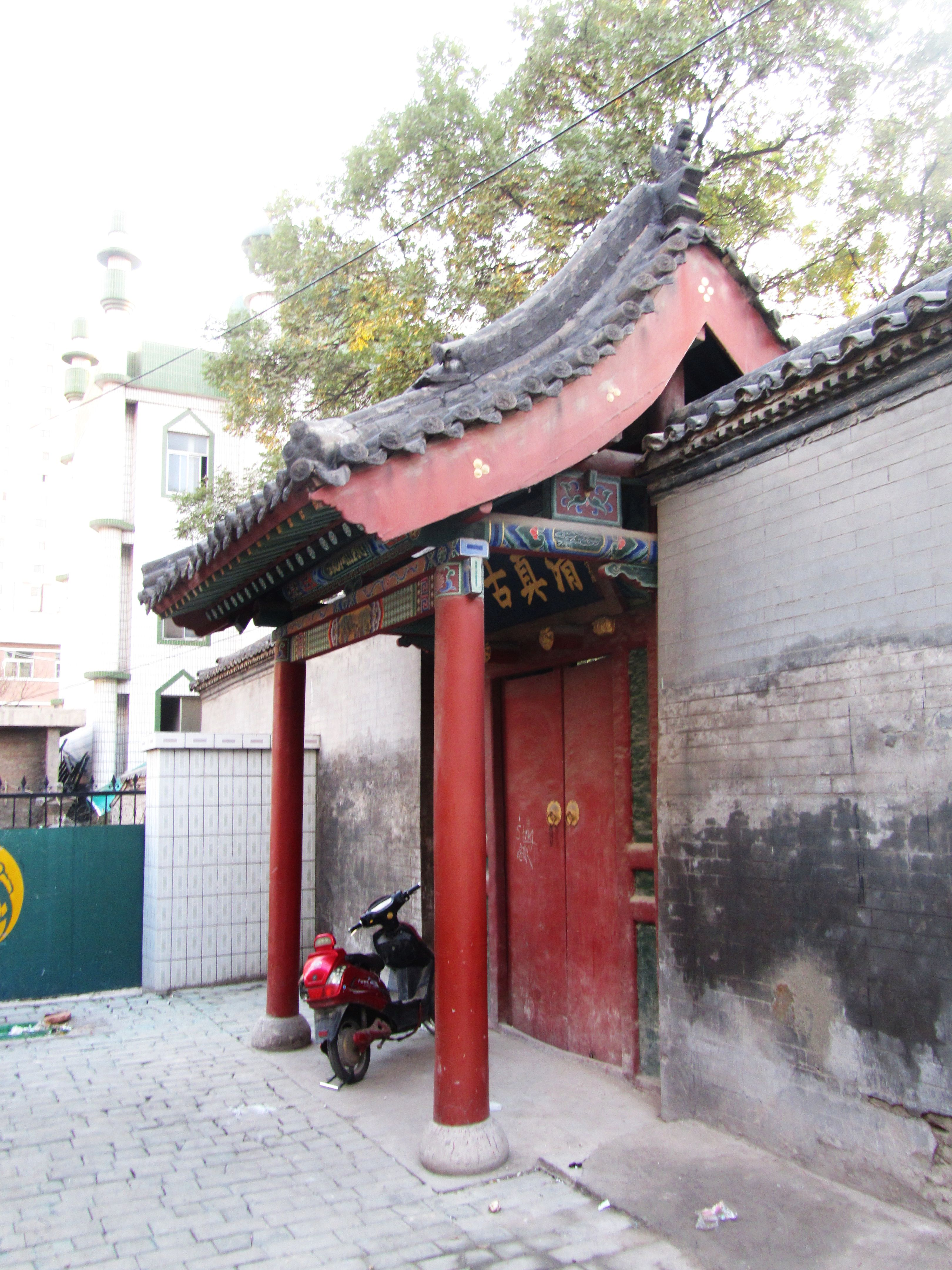 太原清真古寺东门，在开化寺街向南走的一个小巷子里。